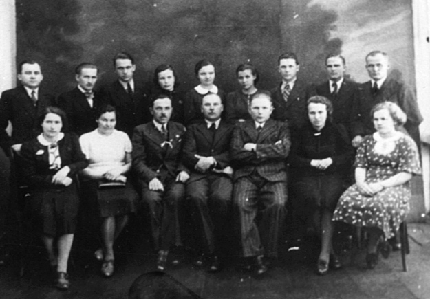 Dyrekcja i pracownicy. 1936 rok.